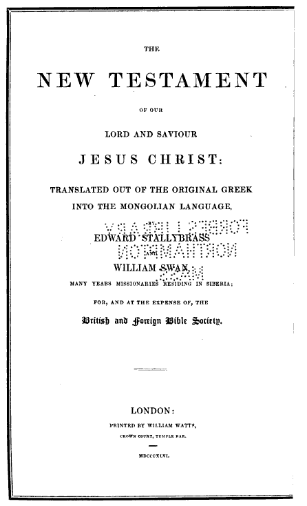 Обложка Нового Завета на монгольском языке в переводе Эдварда Сталибраса и Вильяма Свана.